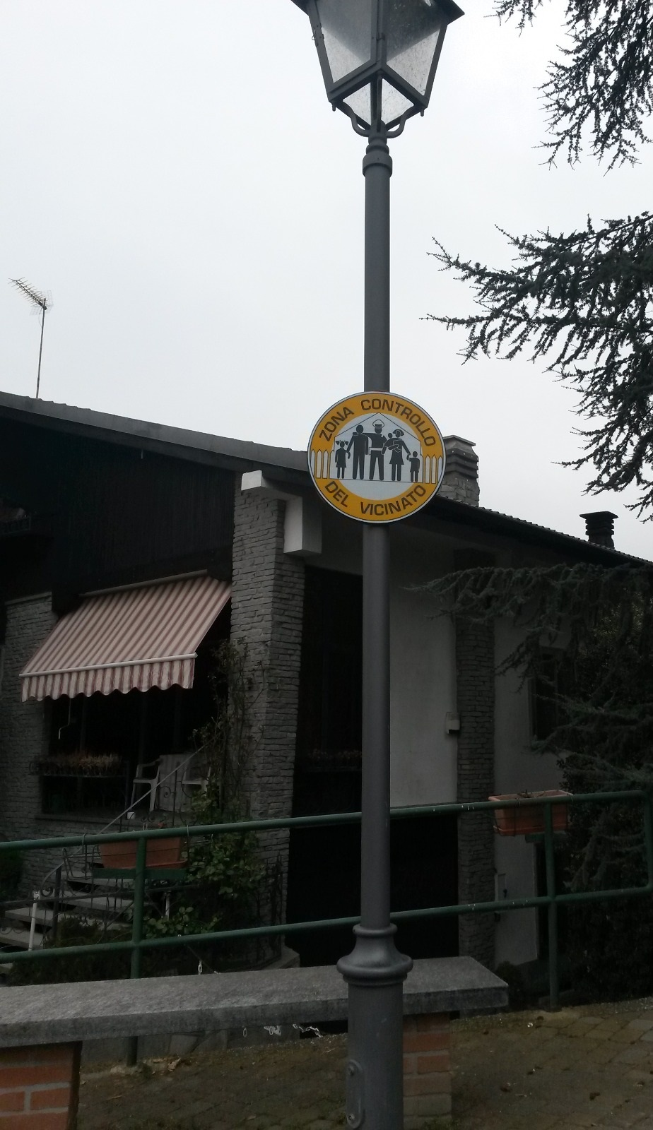 Controllo di Vicinato